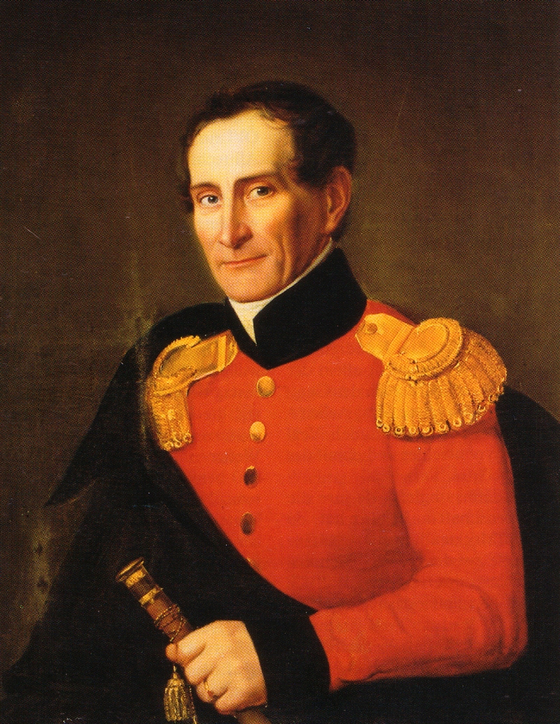 Portrait des Erblandmarschalls Ferdinand Freiherr von Maltzan, geboren 1778 in Werder bei Penzlin, gestorben 1849 in Penzlin. Hob freiwillig am 16.Oktober 1816 die Leibeigenschaft auf.